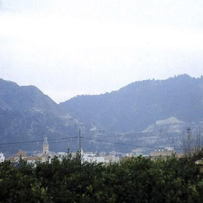 Vista de Beniaján, desde la huerta